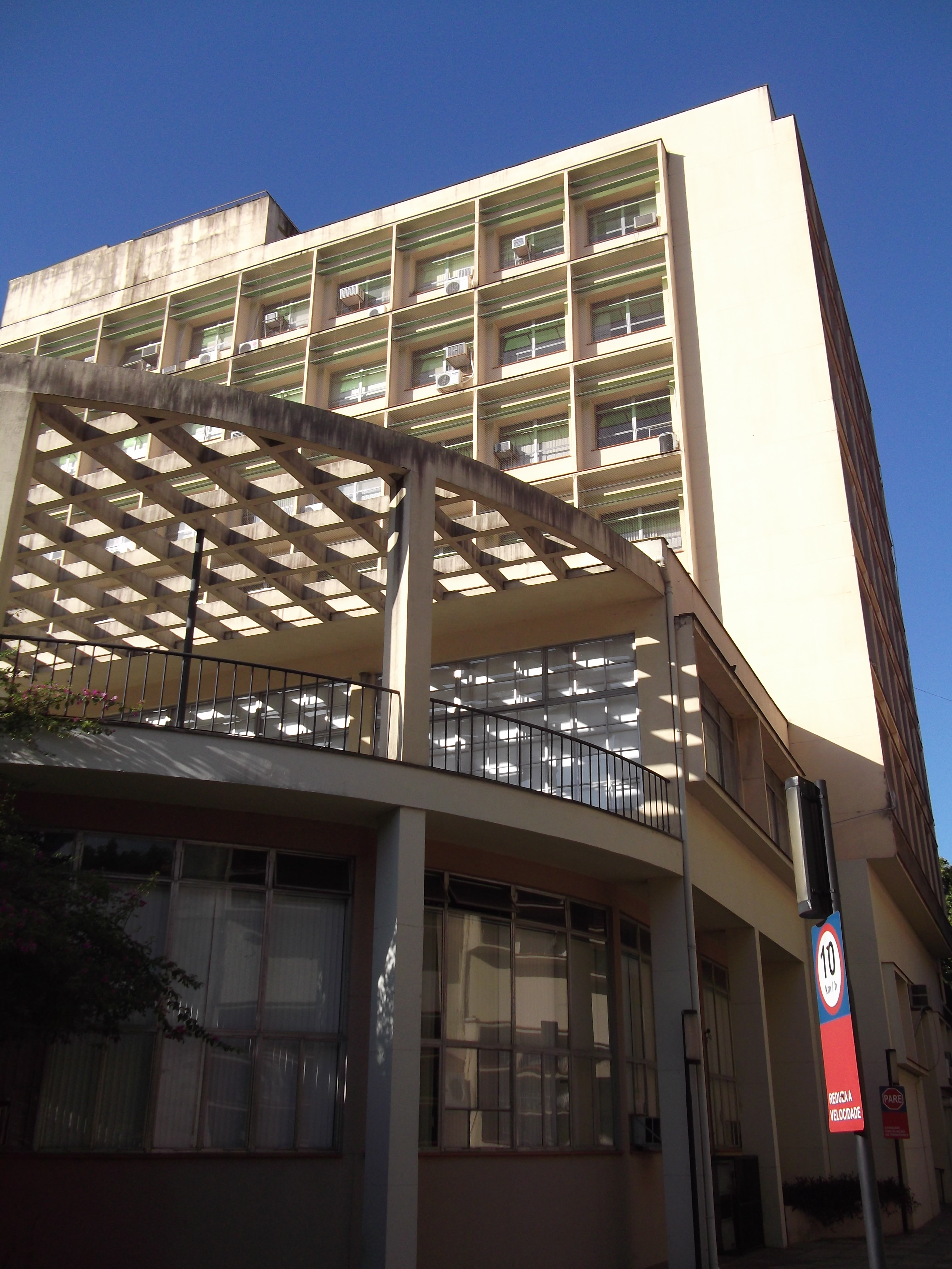 Reitoria da Universidade Federal do Rio Grande do Sul